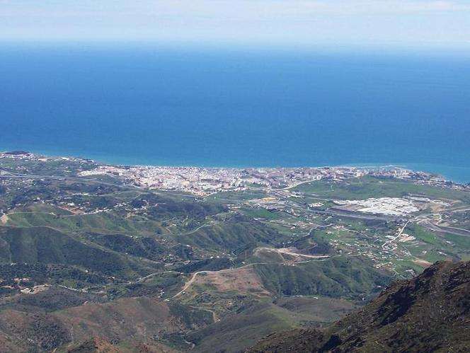 Foto mía de estepona (dominio público)